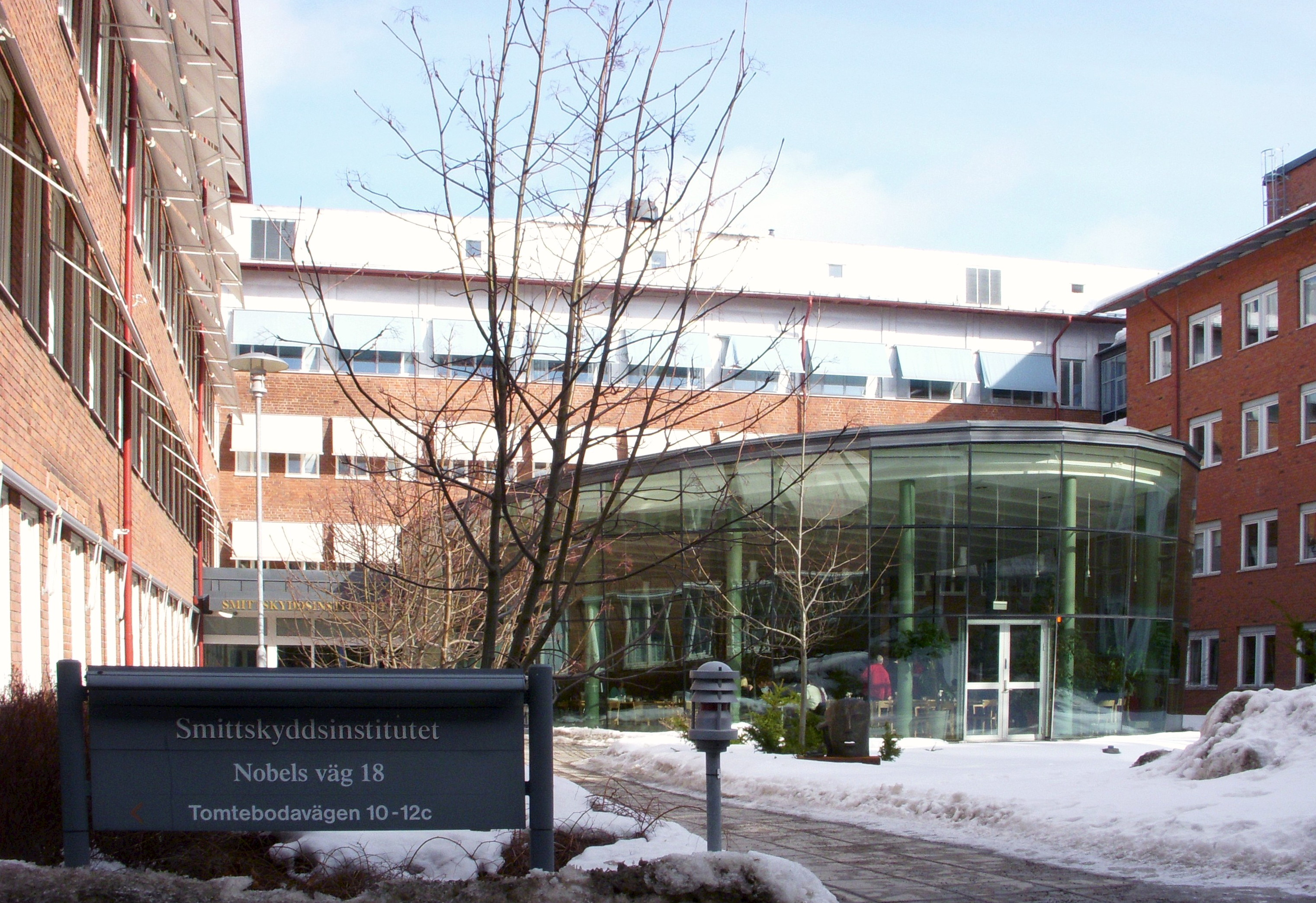 F.d. Smittskyddsinstitutet (nu Folkhälsomyndigheten) i Solna. Arkitekt: Ture Ryberg